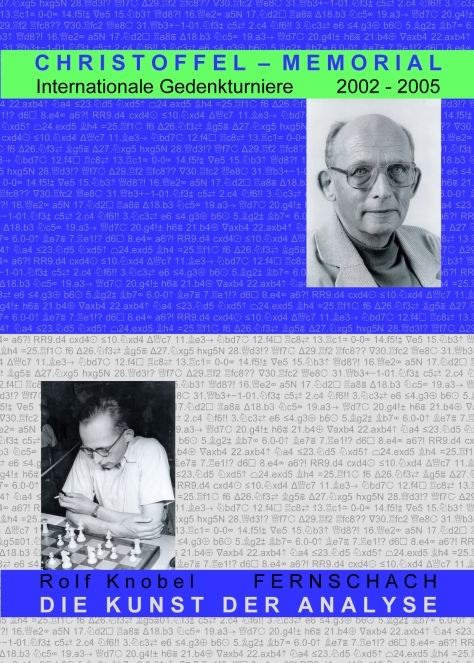 Knobel - Die Kunst der Analyse, Buchdeckel, entworfen von Anton Thaler (Partie Knobel-Al Thani)